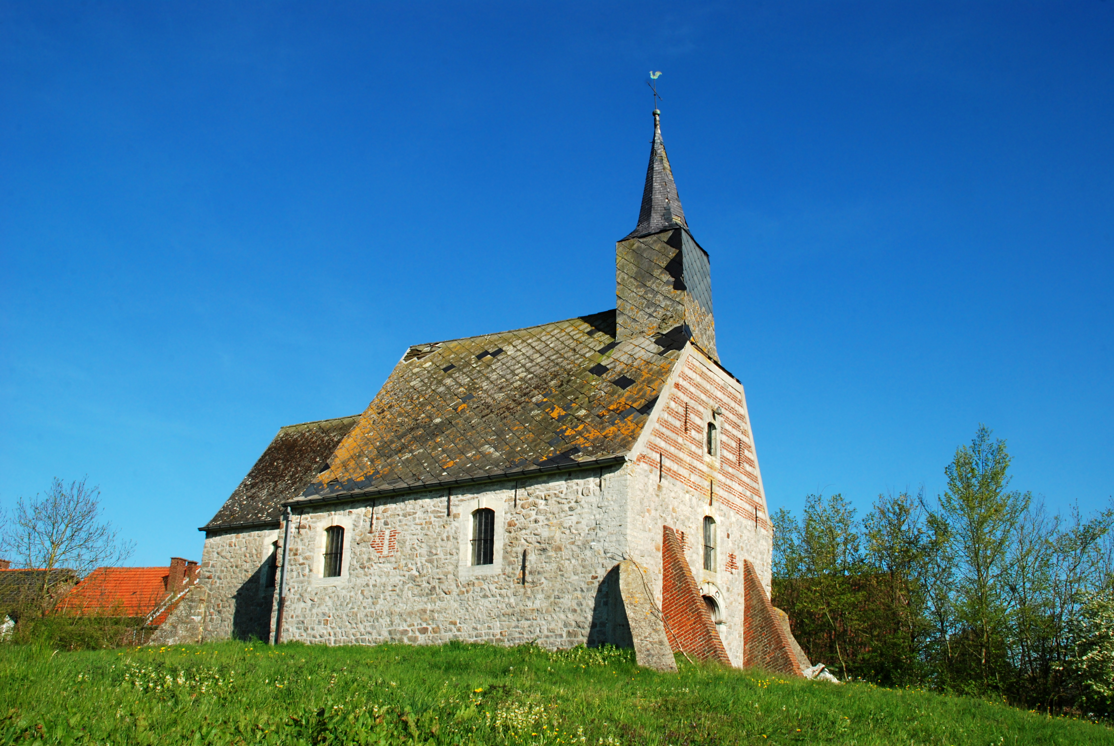 Belgique - Brabant flamand - Hoegaarden - Chapelle Saint-Servais de Rommersom